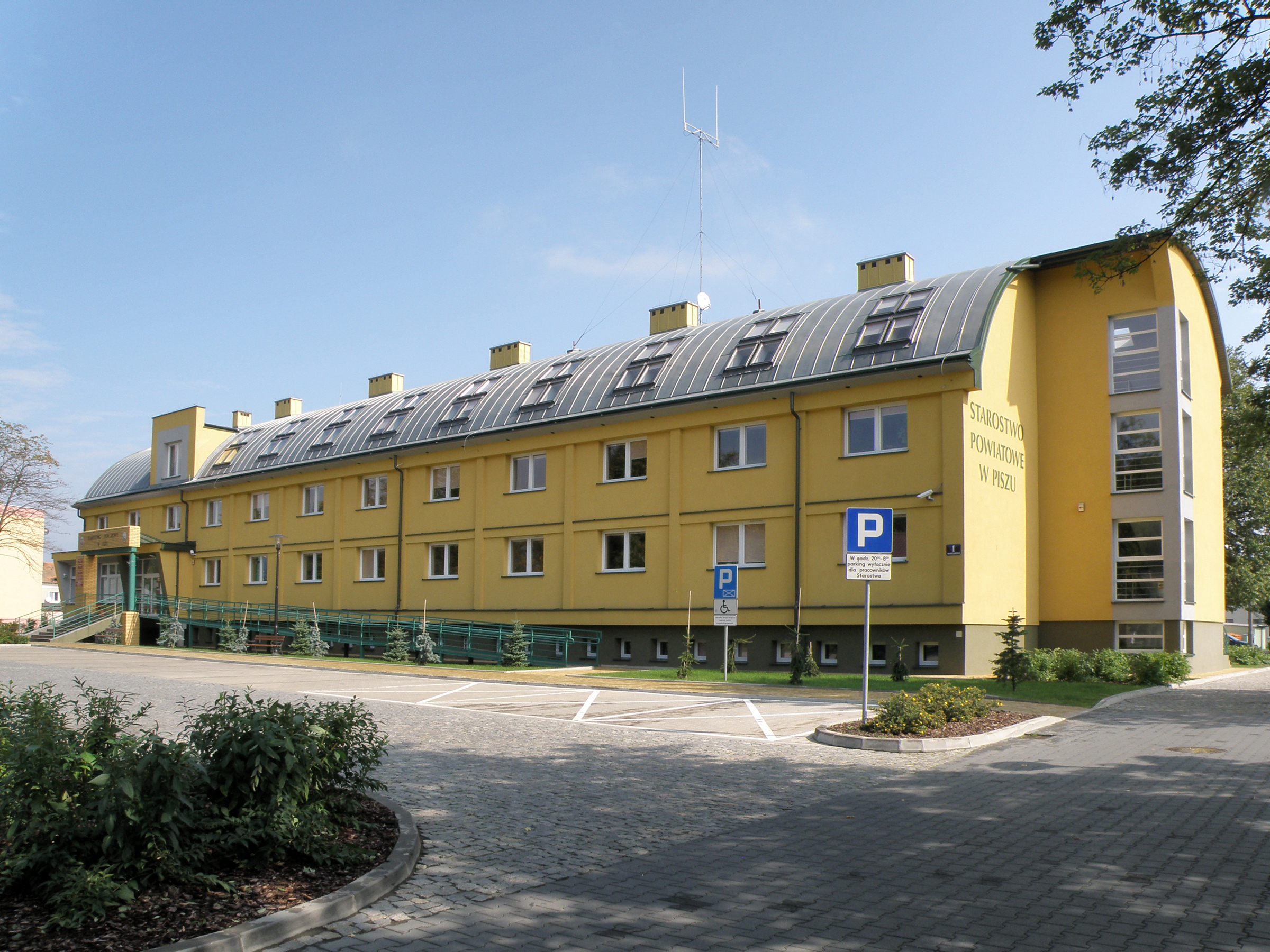 Polska, Pisz - Starostwo Powiatowe, ul. Warszawska 1, 12-200 Pisz This photo of Warmian-Masurian Voivodeship was taken during Wikiexpedition 2012 set up by Wikimedia Polska Association.You can see all photographs in category Wikiekspedycja 2012. The making of this document was supported by Wikimedia Polska.